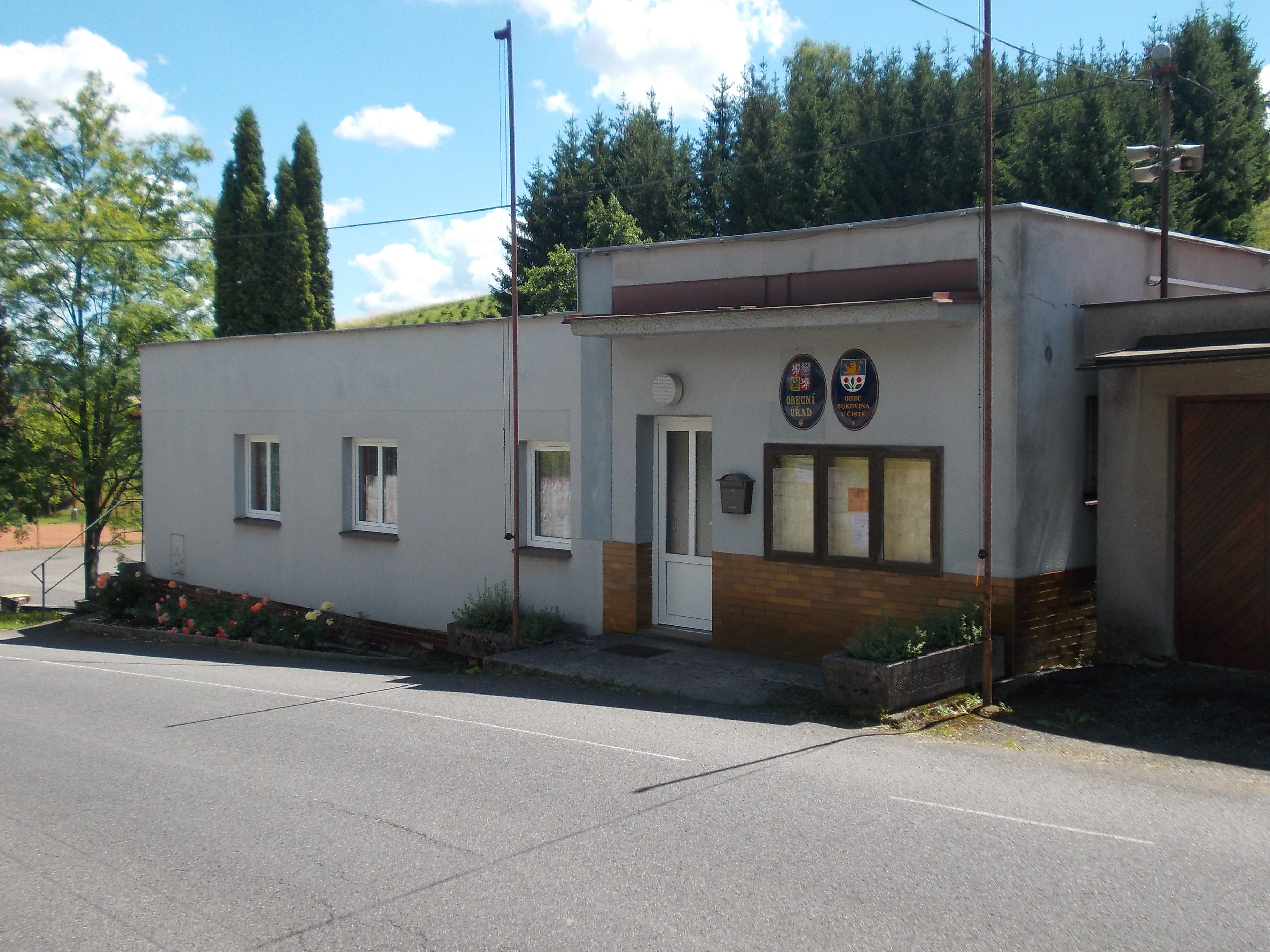 Bukovina u Čisté - obecní úřad